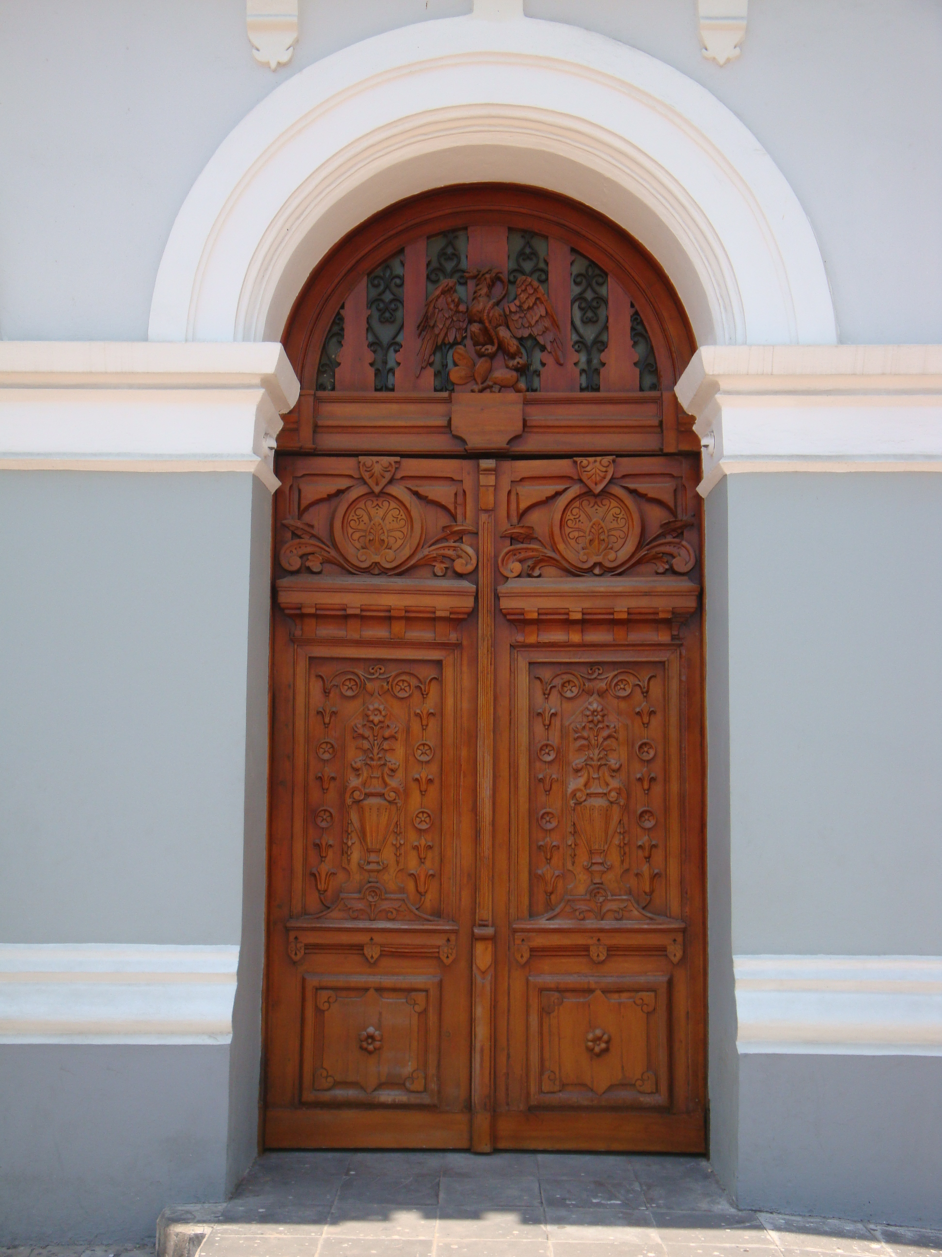 Una de las tres puertas frontales del Palacio de Gobierno de Tabasco. Villahermosa, Tabasco, México.